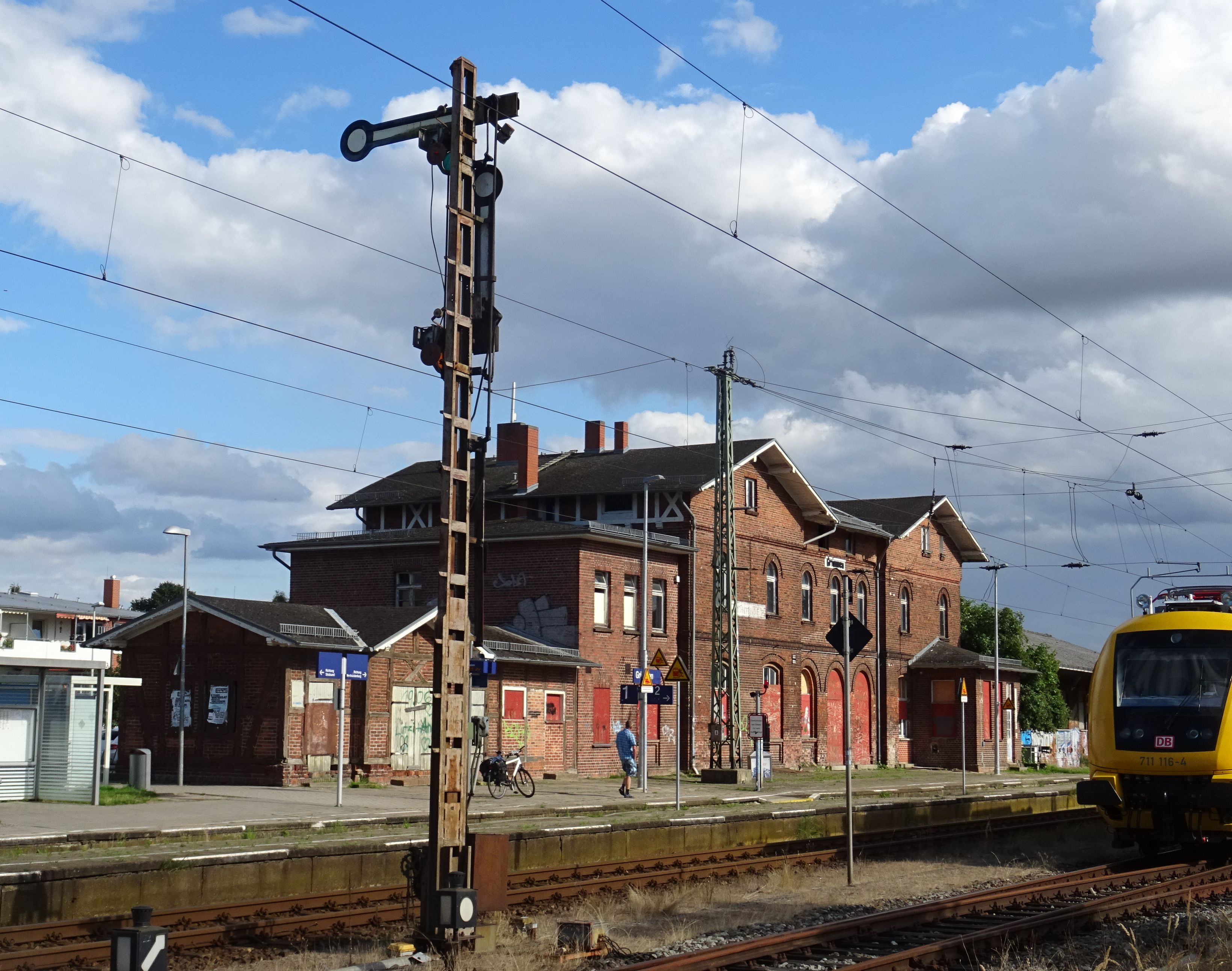 Bahnhof Grimmen, Blick von Nordwesten auf das denkmalgeschützte Empfangsgebäude